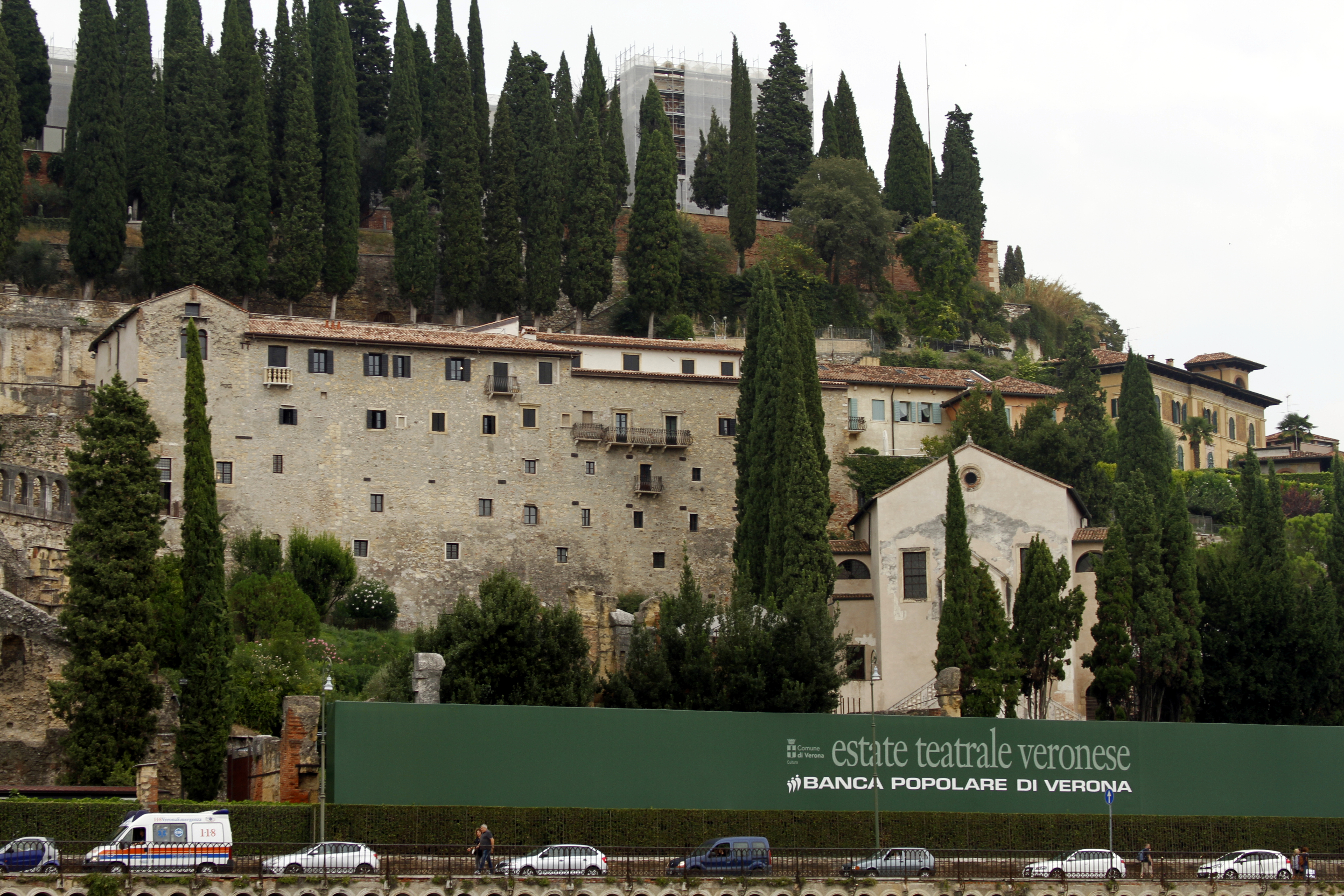 Castel San Pietro - Verona